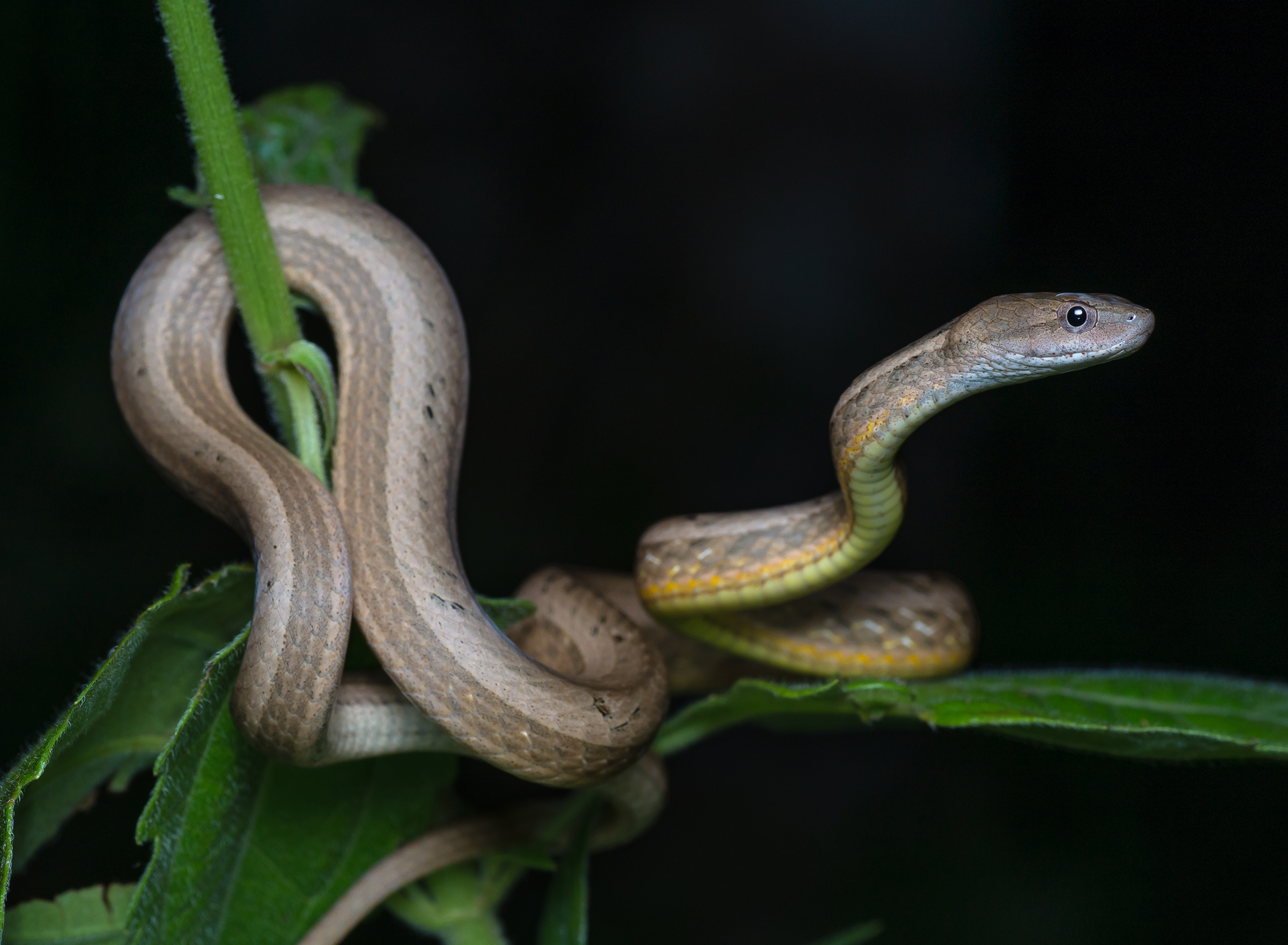 Psammodynastes pulverulentus